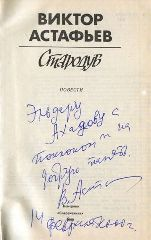 Автограф В.П.Астафьева